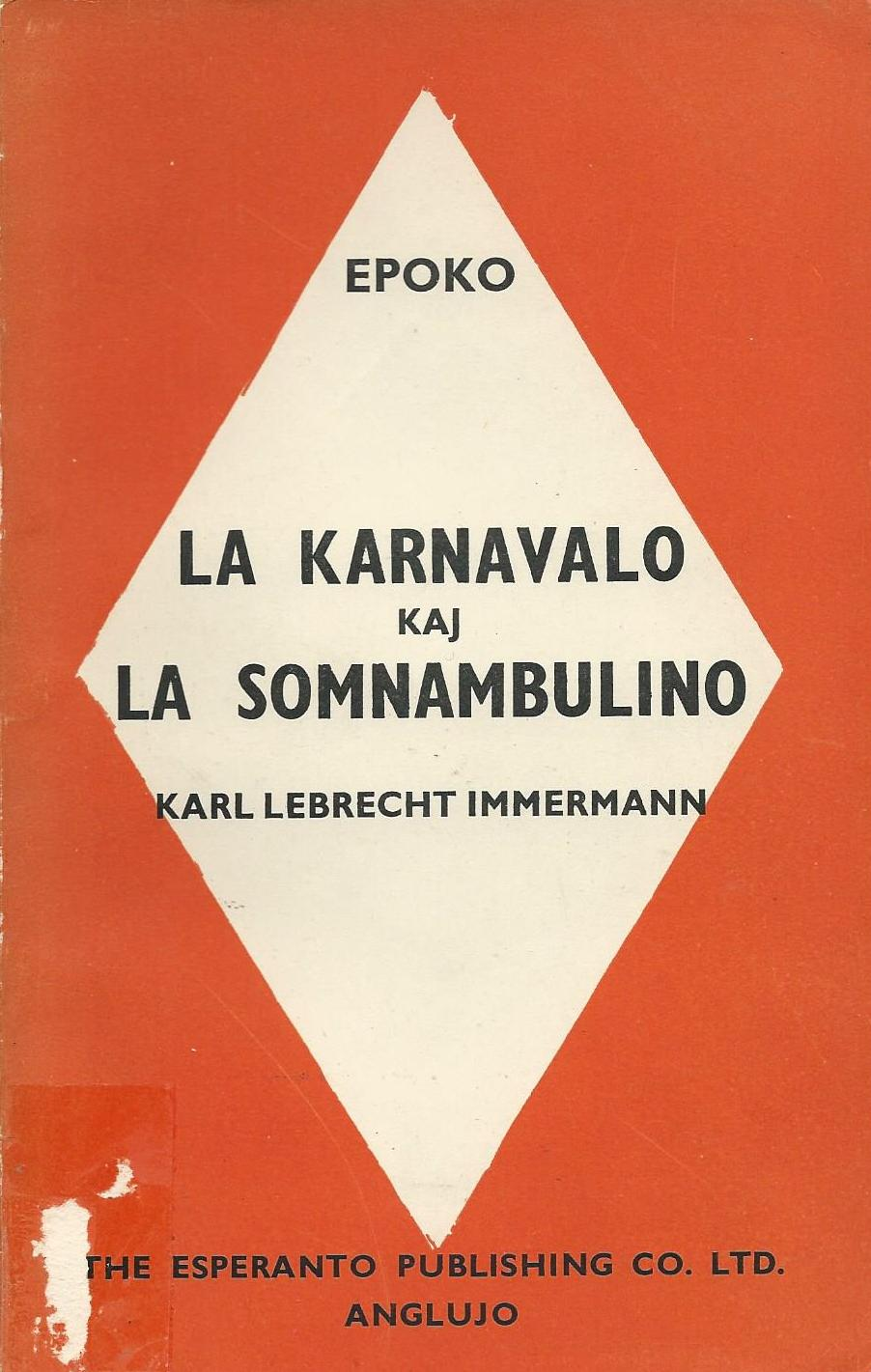 kovrilo de "La Karnavalo kaj La Somnambulino", 1952